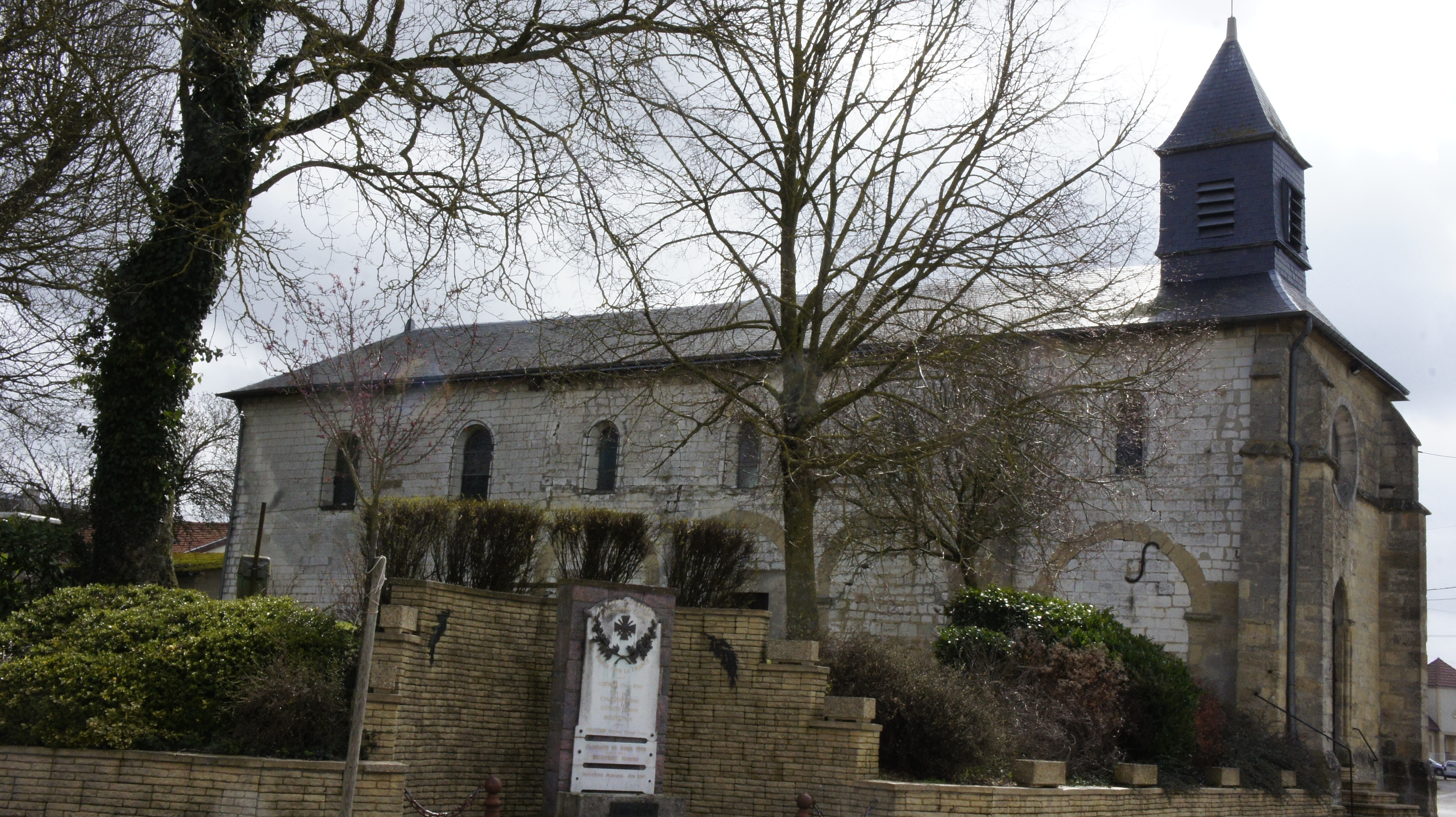 Cauroy, vue de l'église et du monument aux morts .